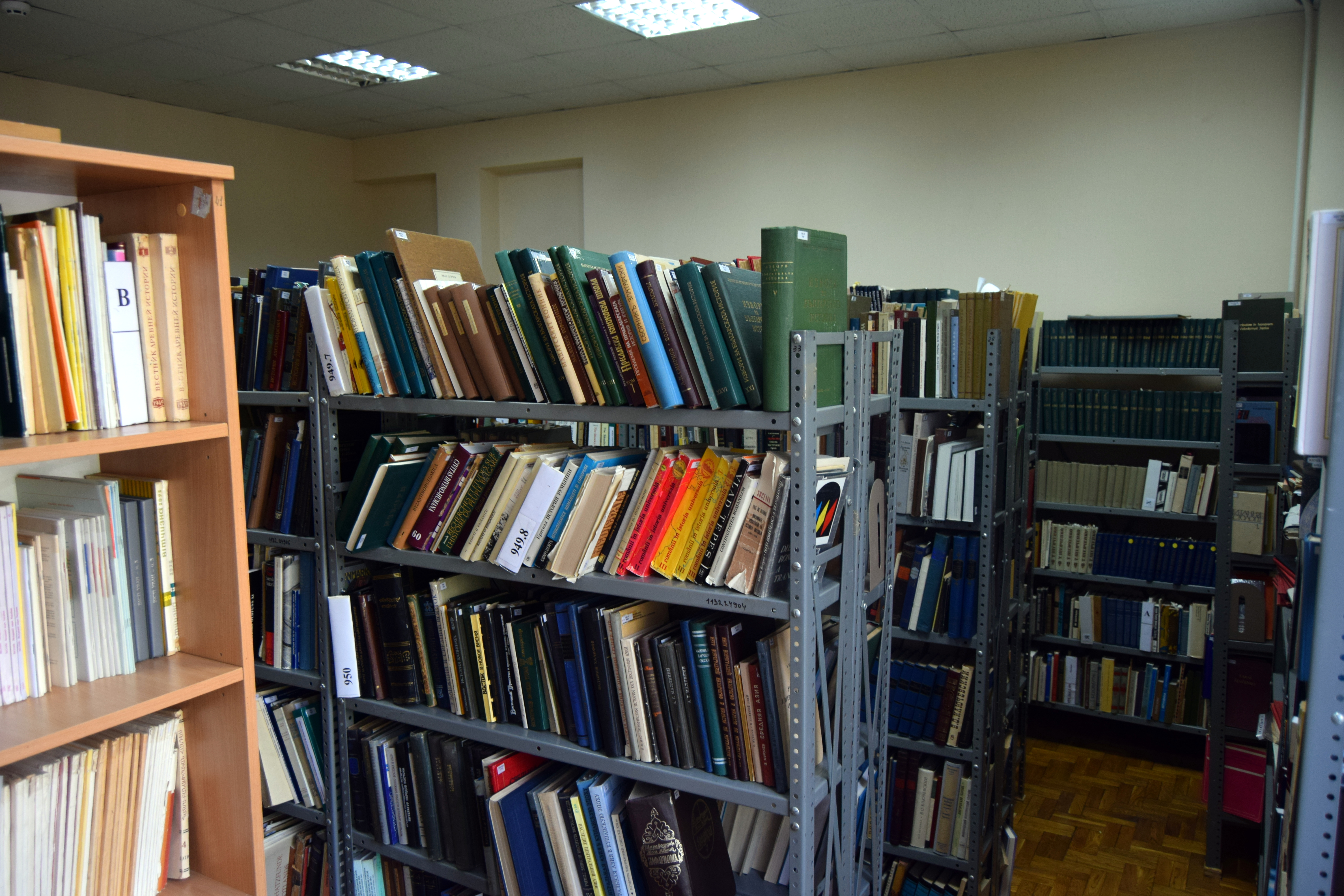 Книжкова Колекція Омеляна Пріцака у Науковій бібліотеці Національного університету НаУКМА, Київ